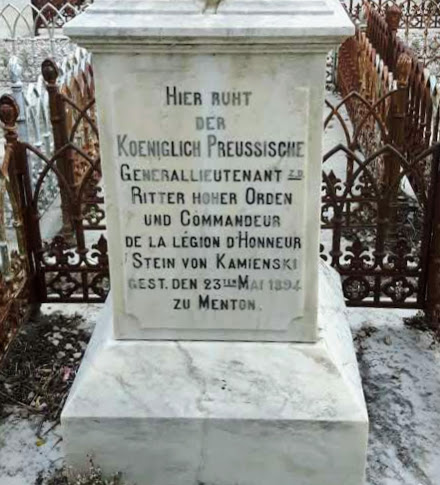 Grab von Oskar Wilhelm Stein von Kaminski auf dem Friedhof von Menton